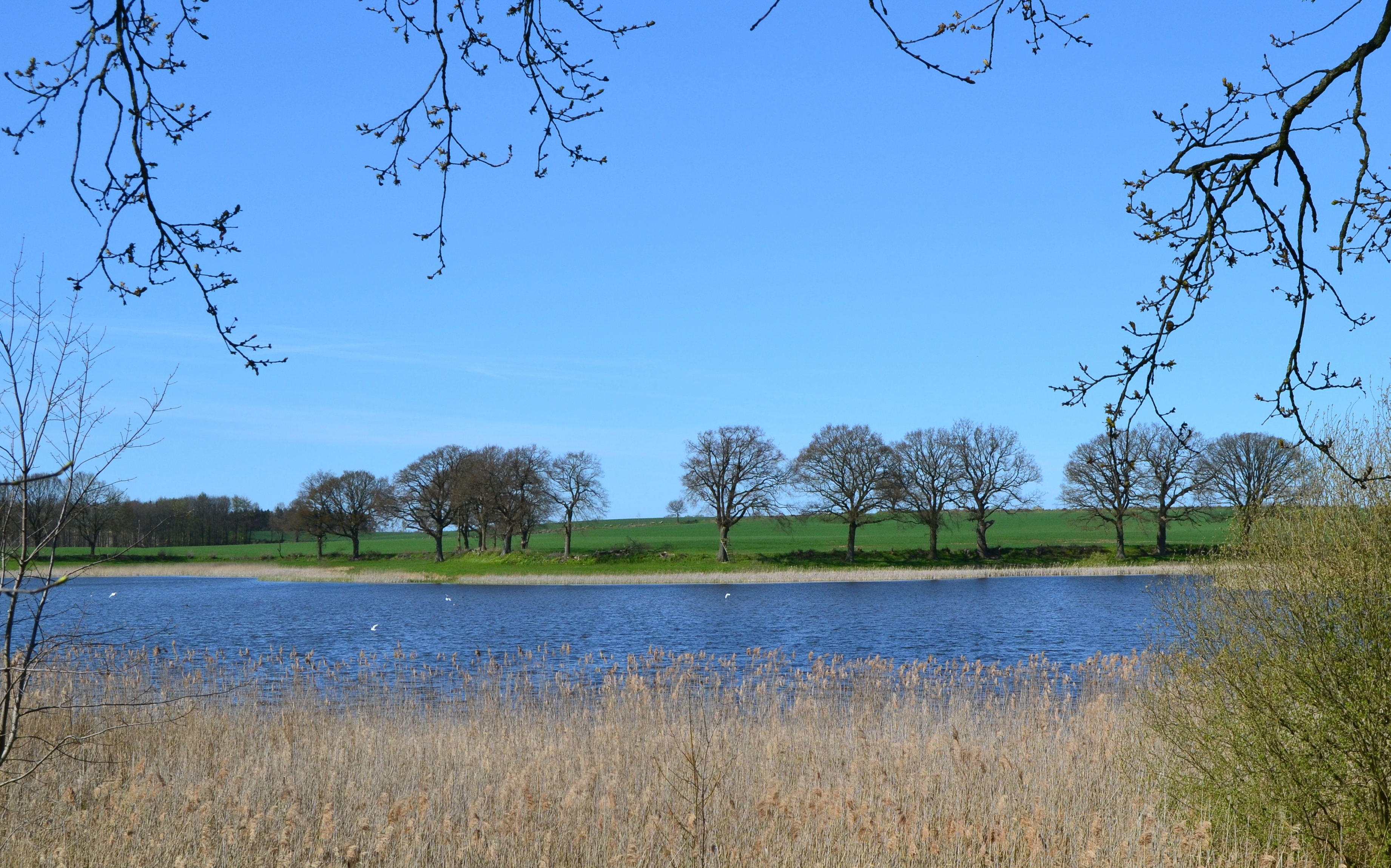 Der Rixdorfer Teich von Südosten aus gesehen, NSG Rixdorfer Teich und Umgebung nach NW, Gemeinde Lebrade, Kreis Plön